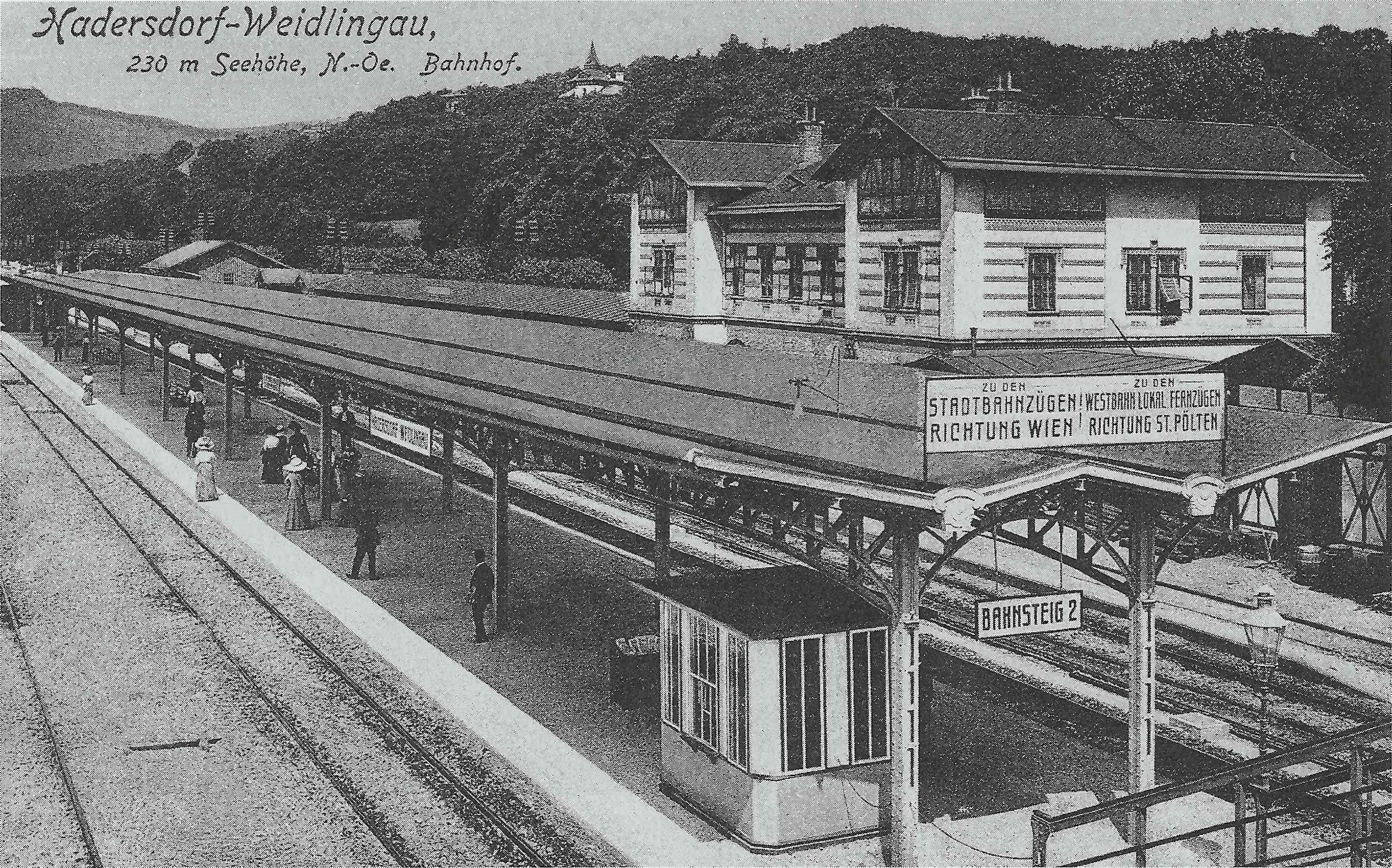 Bahnhof Hadersdorf-Weidlingau